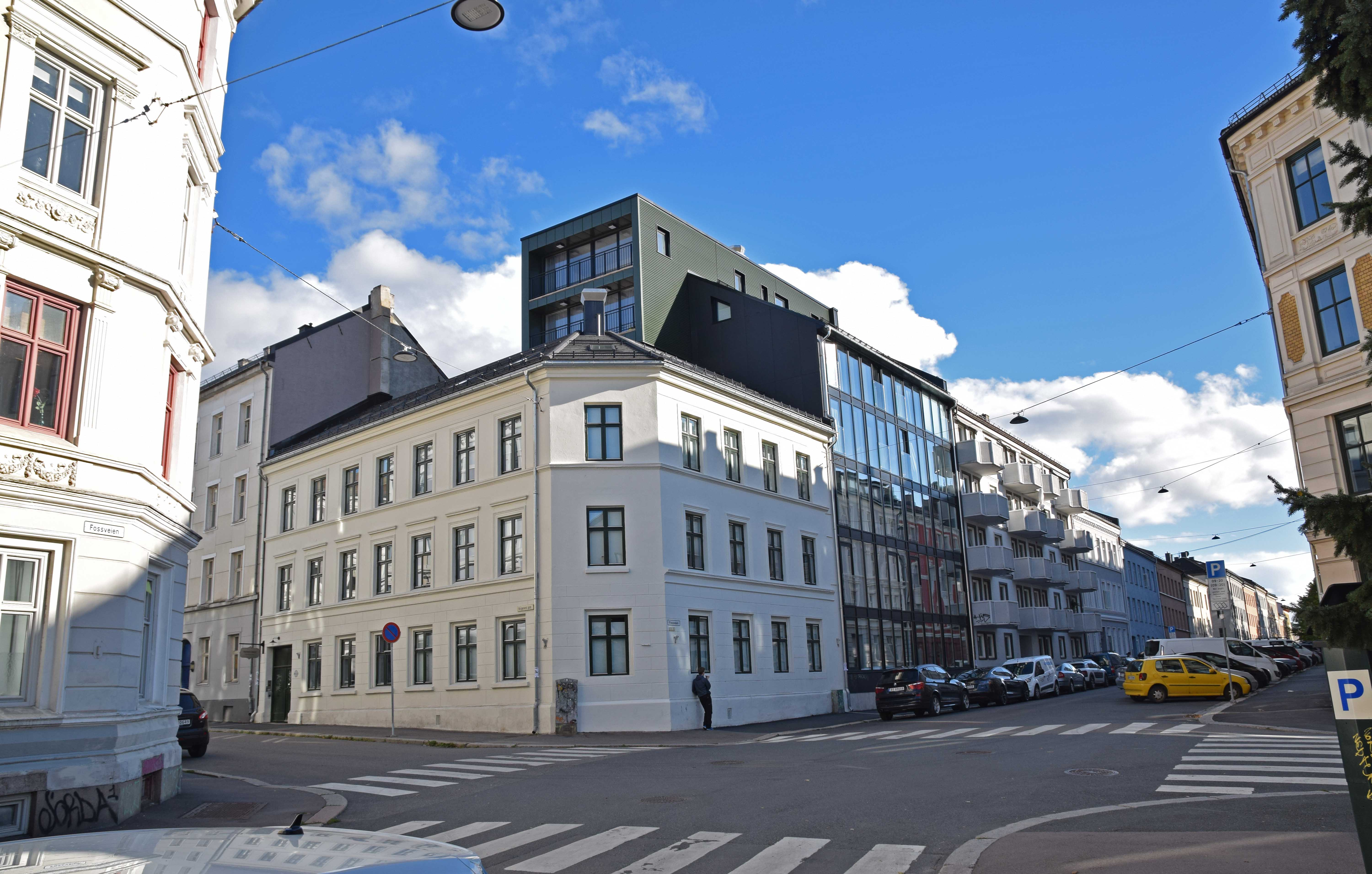 Krysset Fossveien / Helgesens gate, Grünerløkka. Fossveien 19 er nybygg godkjent 2014 i 7 etasjer, erstattet næringsbygg i en etasje. Hjørnegården Helgesens gate 1A bygget 1871 til 1876.